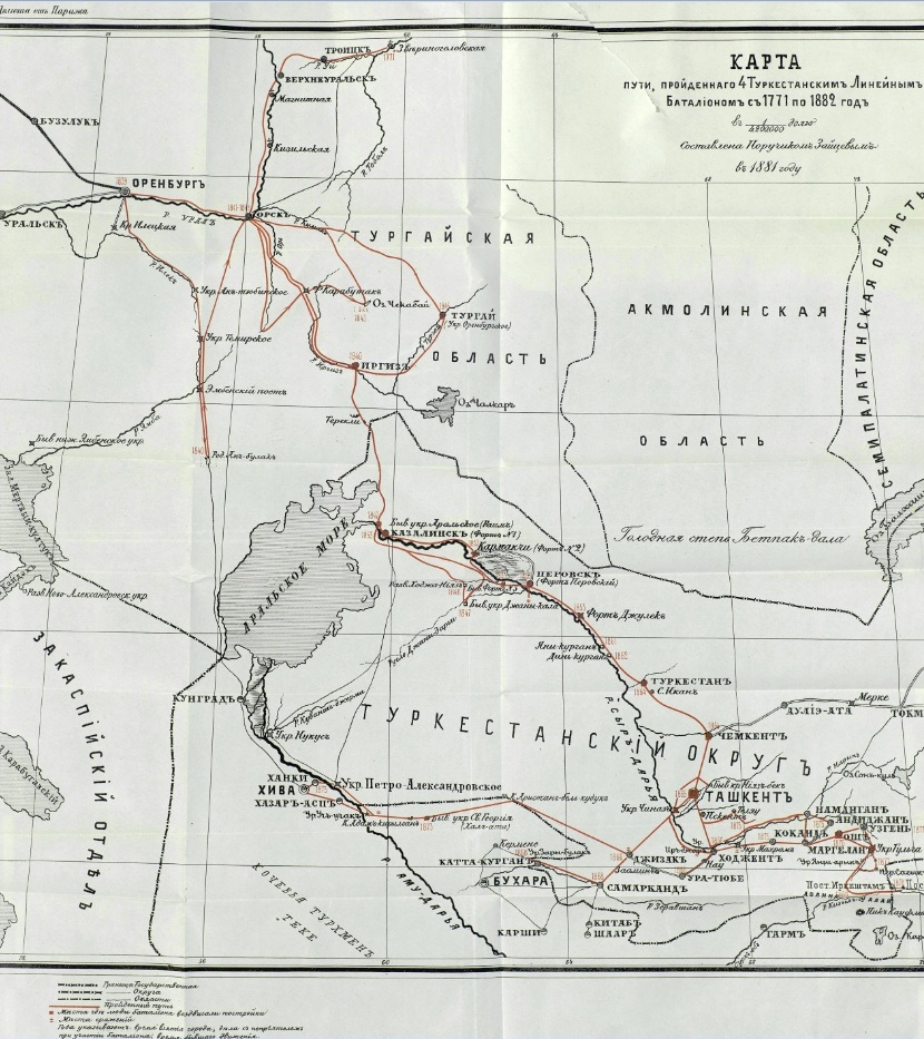 Туркестанские походы русской армии